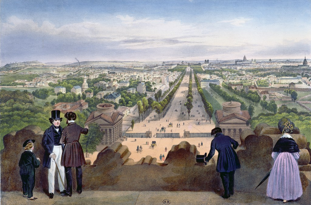 Avenue des Champs-Élysées vue du haut de l'Arc de Triomphe, lithographie (?) de Félix Benoist (1818-1896). Les bâtiments de la barrière de l'Étoile sont détruits en 1859.